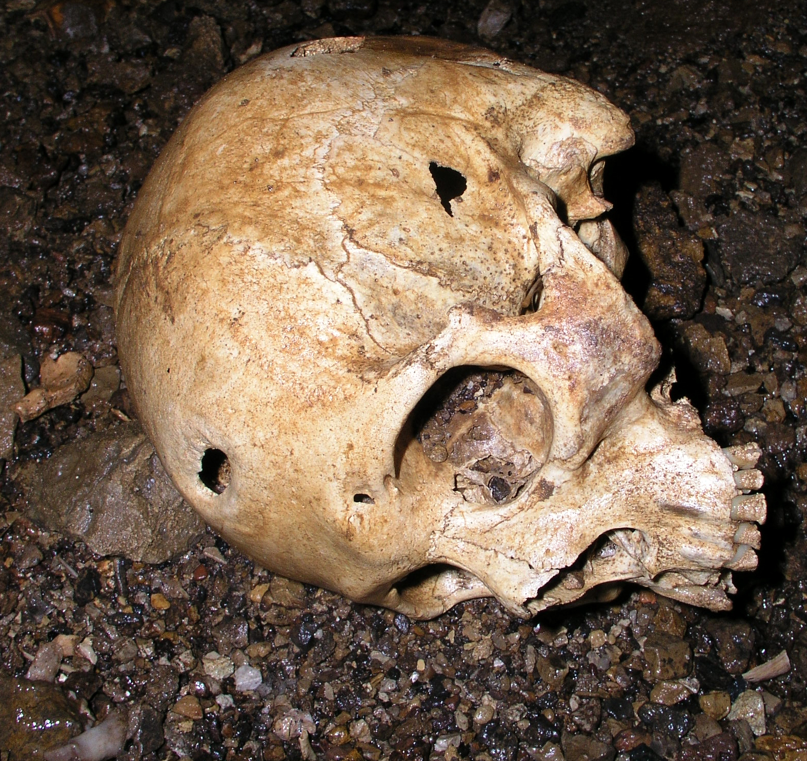 Craneo trepanado del tragadero de Chaquil (Soloco, Chachapoyas, Amazonas, Peru)